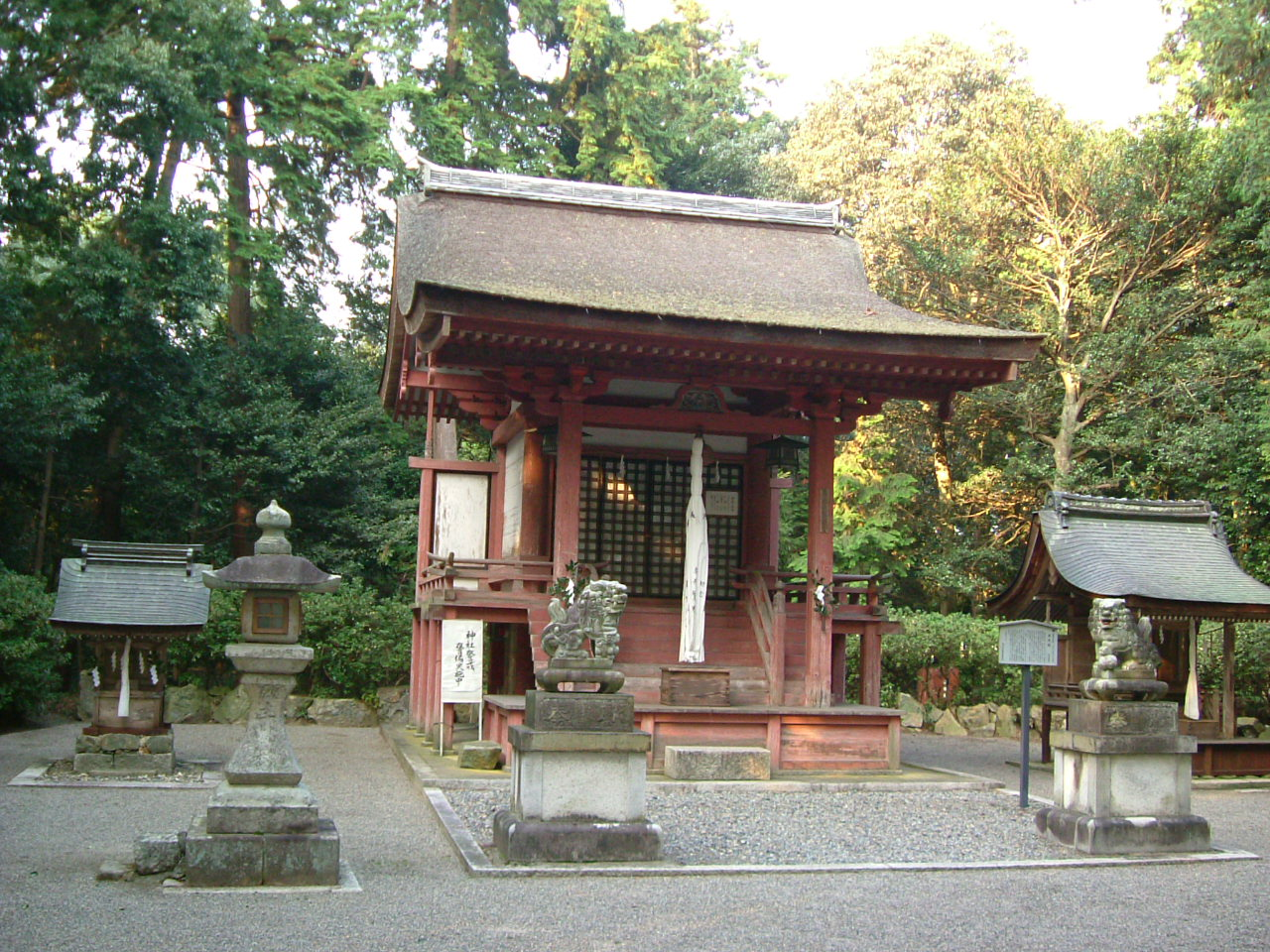 苗村神社東本殿。 Taken by User:Yusuke.ogawa.